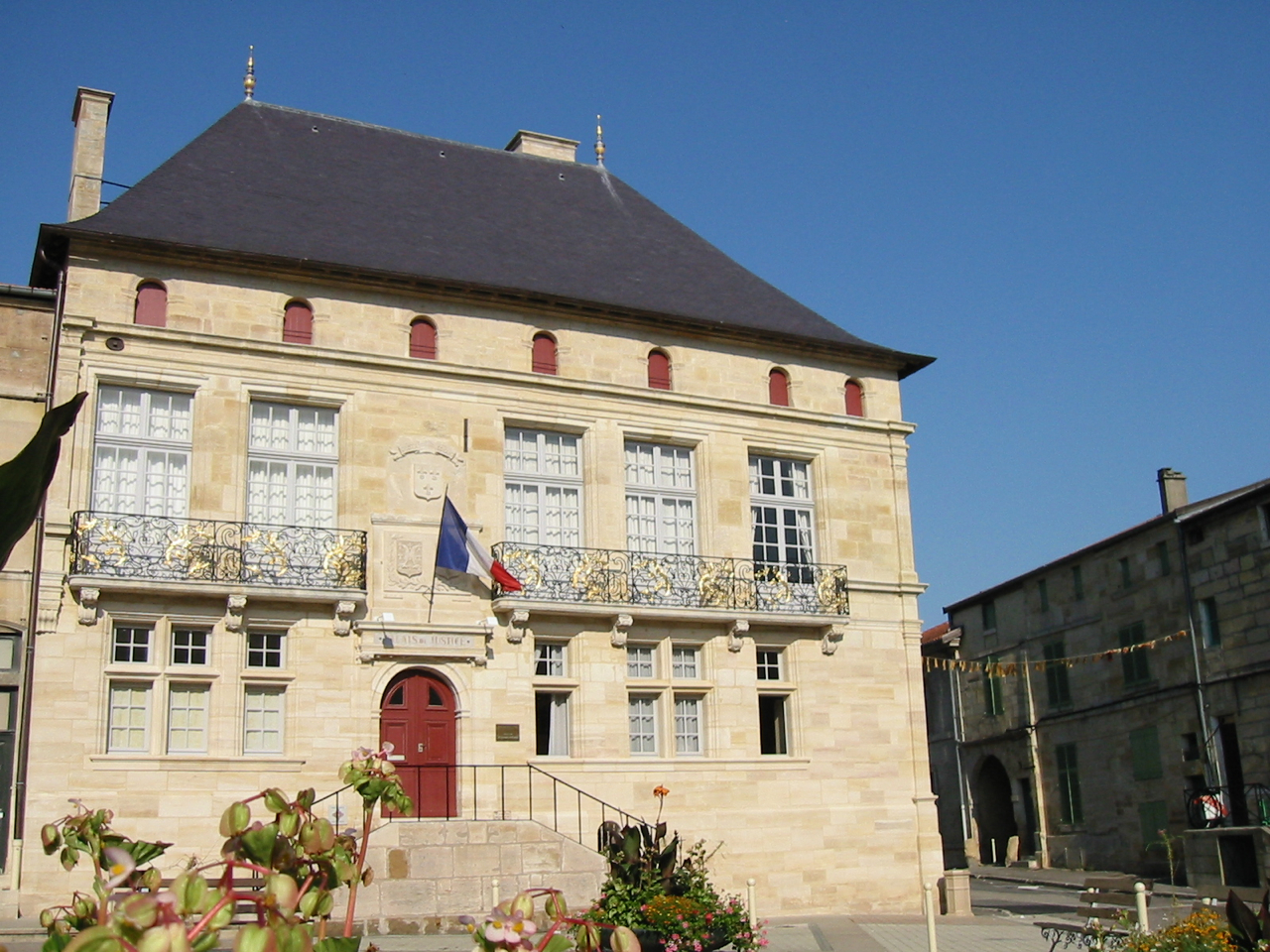 Hôtel de Florainville à Bar-le-Duc (XVI° et XVIII°), Lorraine, France